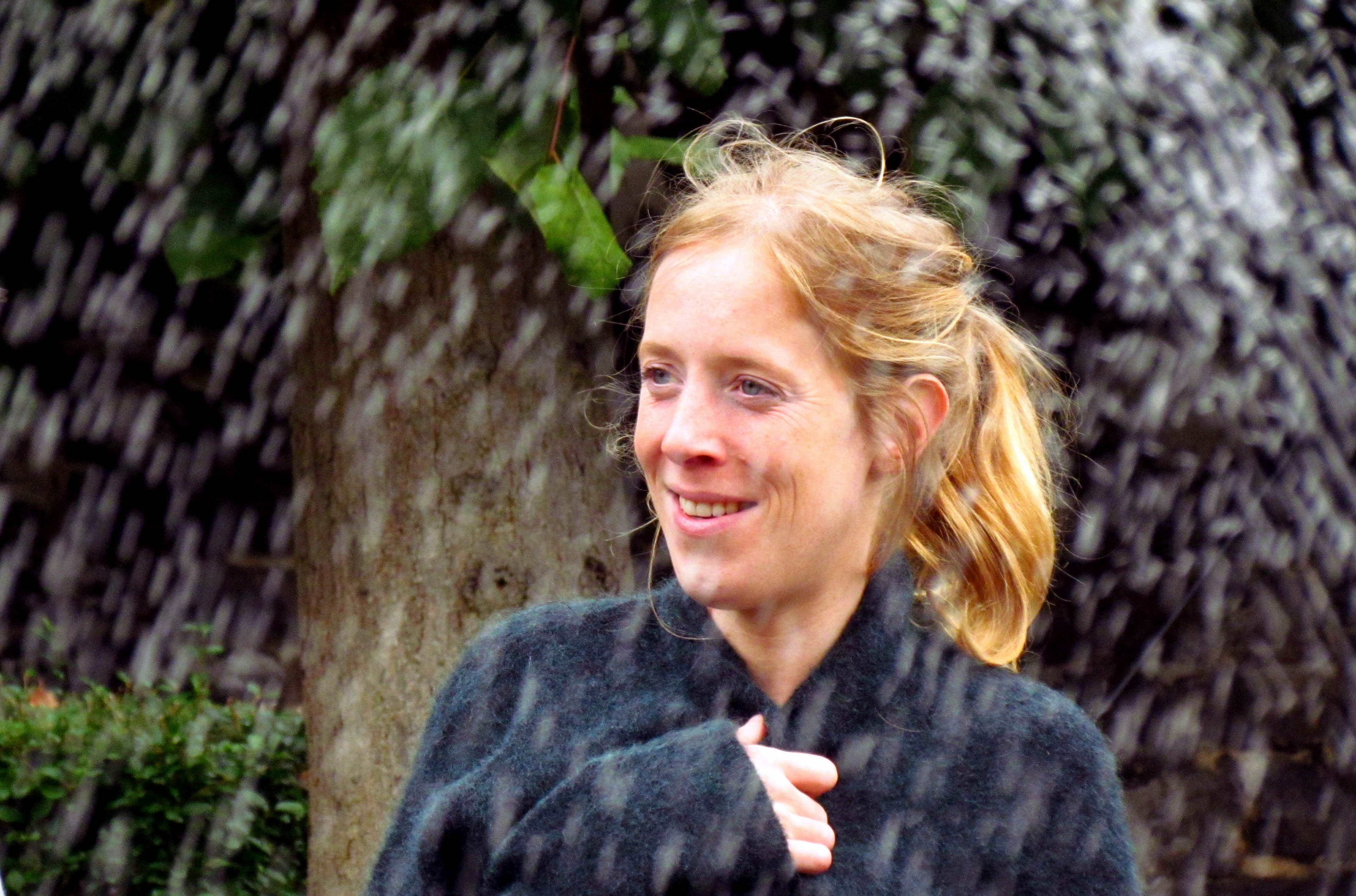 Christelle Cornil au Festival international du film francophone de Namur 2011.